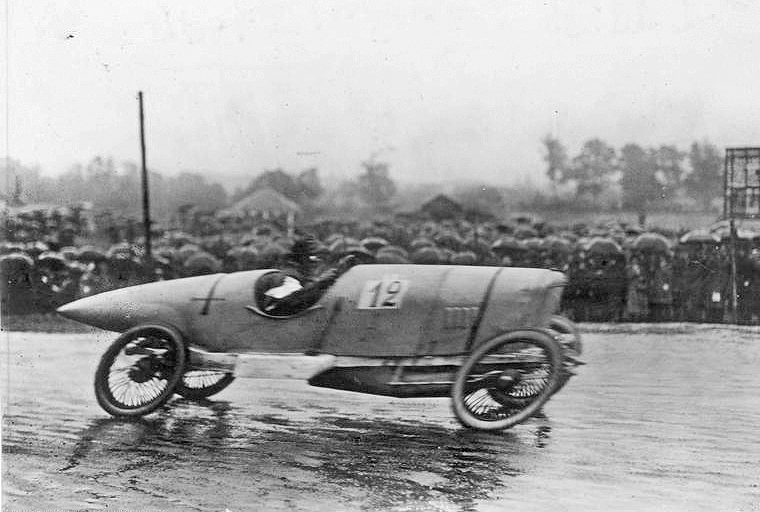 Autorennen im Grunewald, Berlin Vom Berliner Autorennen im Grunewald. Gebser auf Dixi, der Sieger in der Klasse der 6 P.S.-Wagen